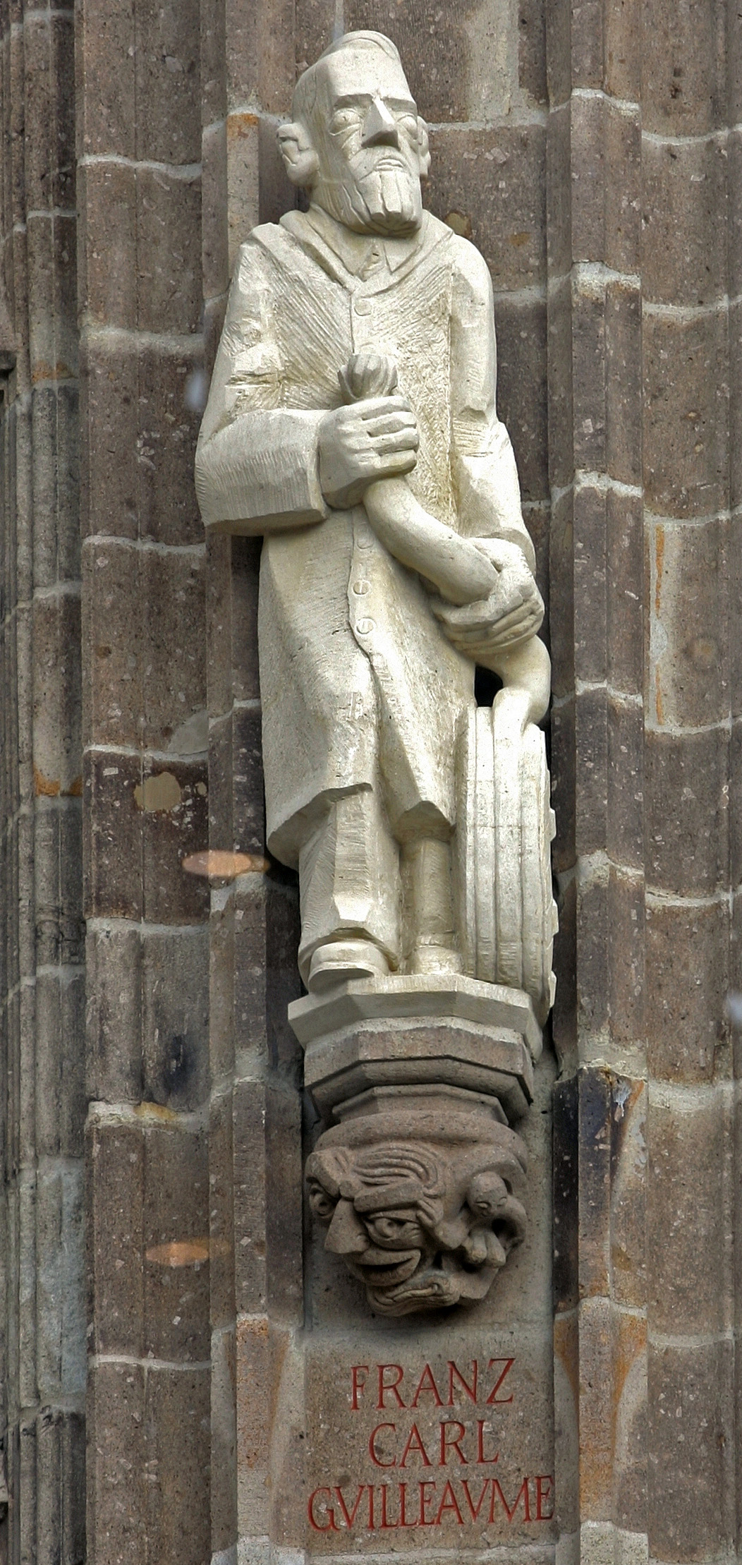 Rathausturm Köln mit der Figur des Franz Carl Guilleaume